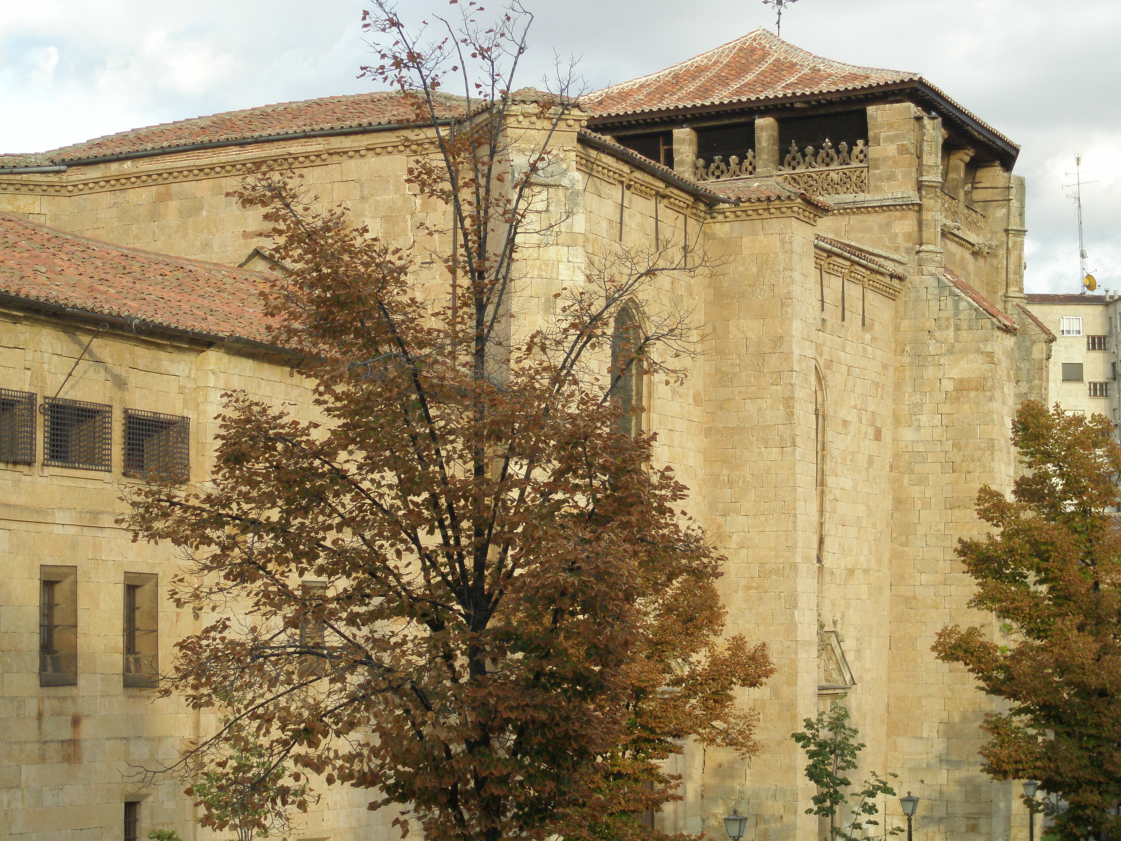 Convento de la Anunciación o de las Úrsulas, Salamanca.